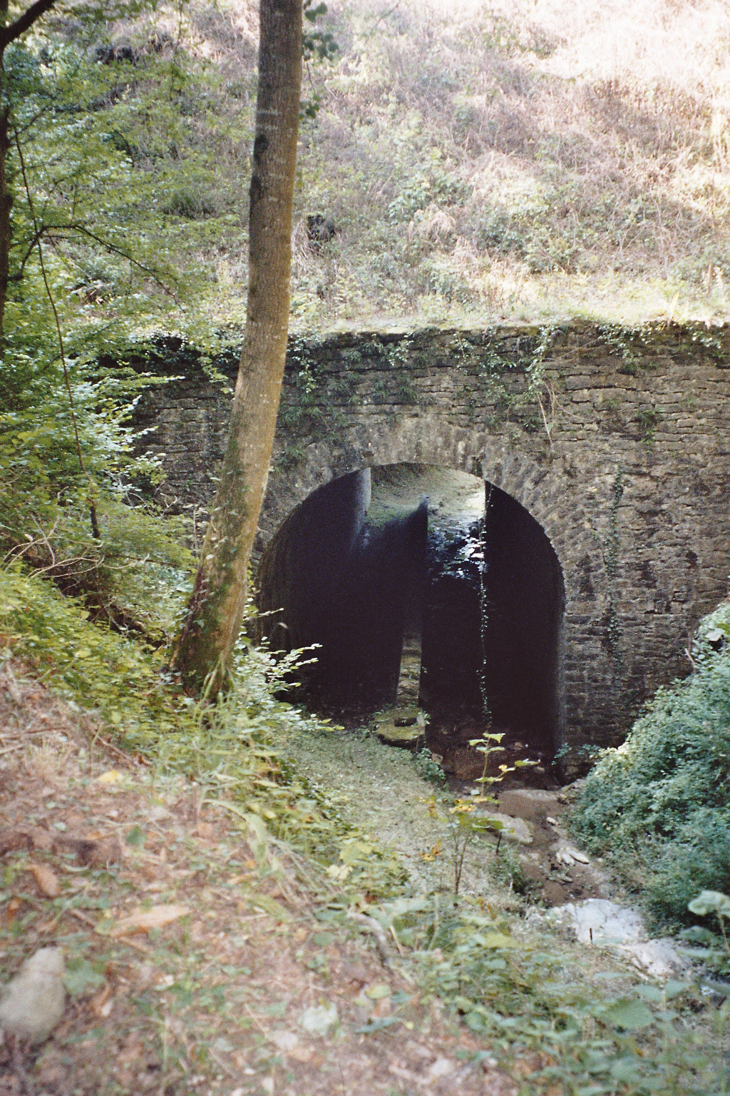 Ancien chemin de fer industriel d'Allevard au Cheylas, dit « Le Tacot » (1873-1972). Pour faire franchir le ruisseau du Catus à la voie, un important ouvrage d'art a été construit. L'arche sous laquelle passent le ruisseau et un chemin piétonnier est assez large pour supporter les crues éventuelles.